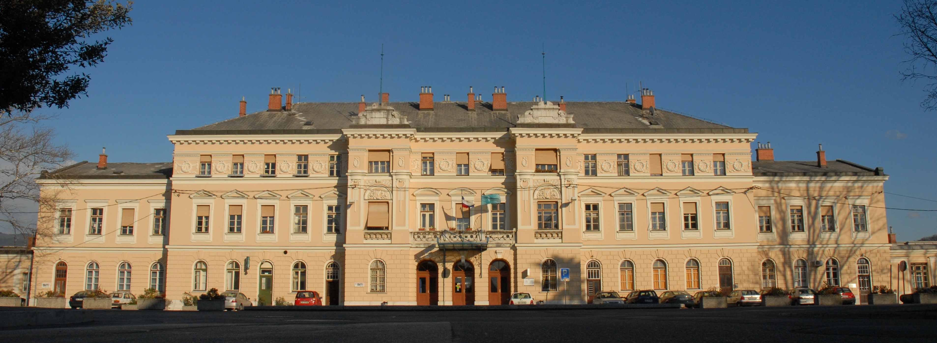 Stazione di Nova Gorica